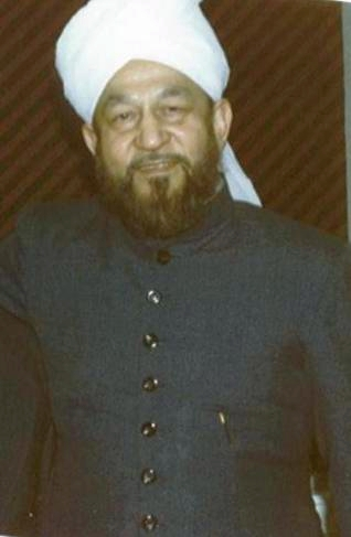 Hadhrat Mirza Tahir Ahmad, Khalifat-ul Massih IV. zu Besuch in Deutschland im Jahre 1989